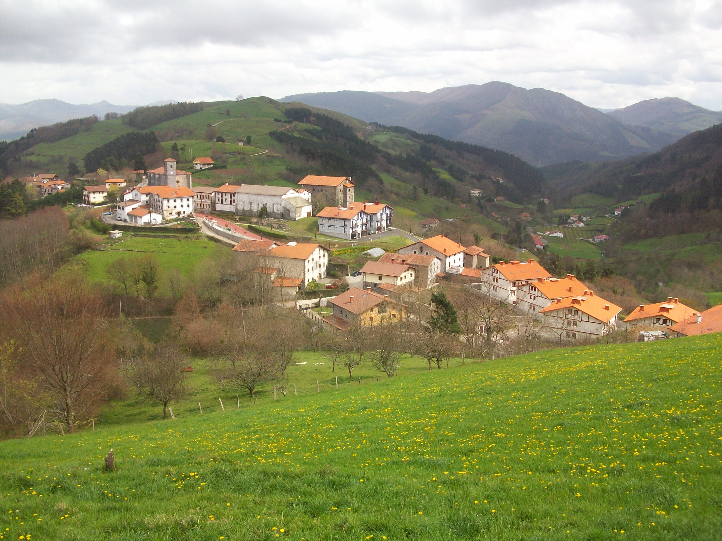 Alkiza, Tolosaldea. Gipuzkoa, Euskal Herria. Alkiza, Tolosaldea. Guipuscoa, Basque Country.